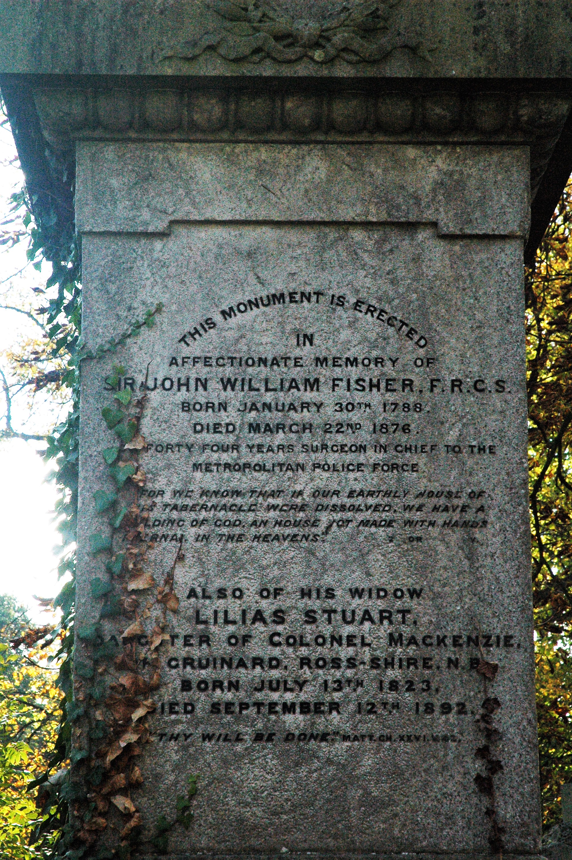 Tomba in onore di John William Fisher, Kensal Green Cemetry, Londra